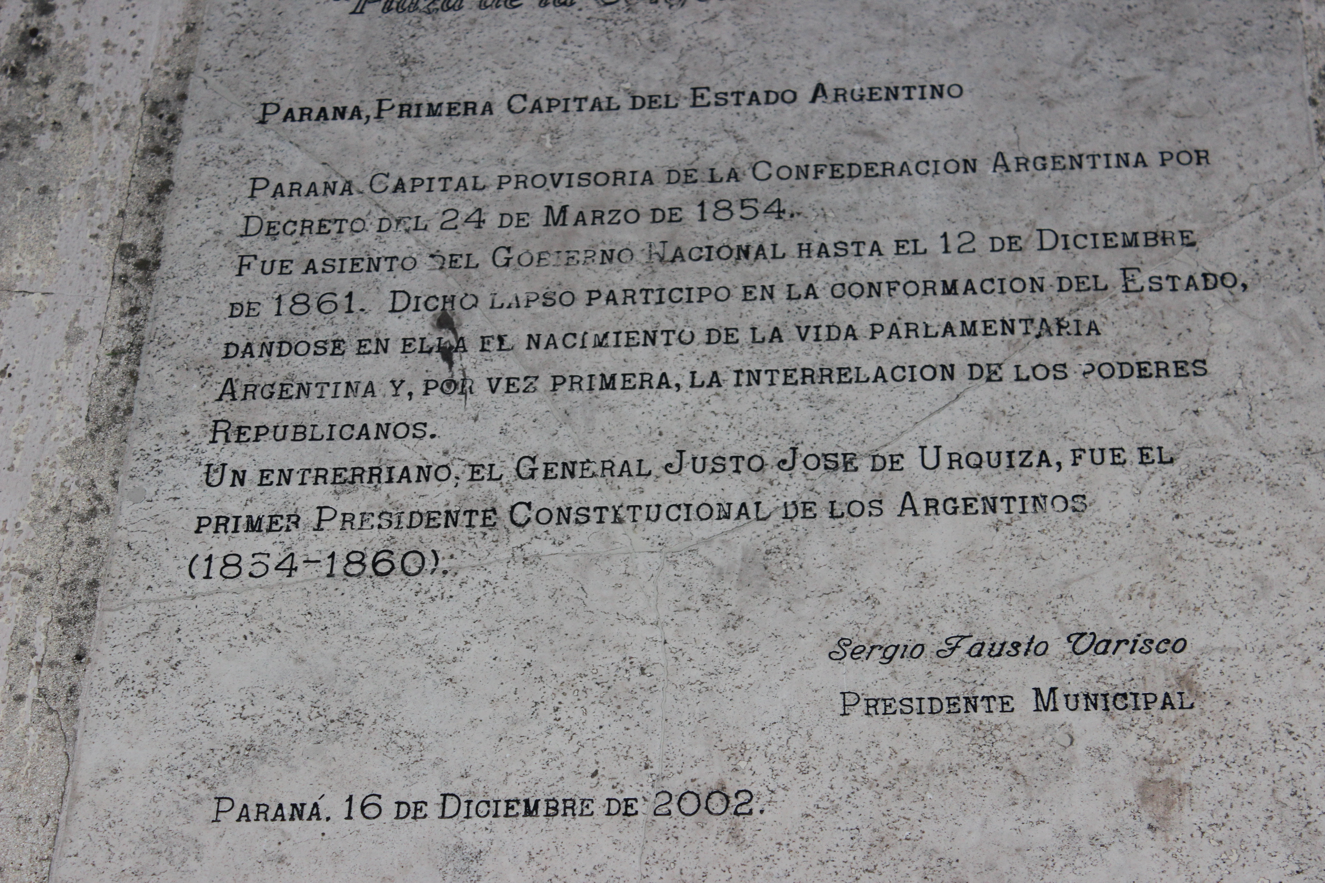 Placa en la plaza de la Confederación Argentina (sobre calle Corrientes a metros de la municipalidad) en la ciudad de Paraná. Conmemora la designación de Paraná como capital del Estado argentino en 1854.